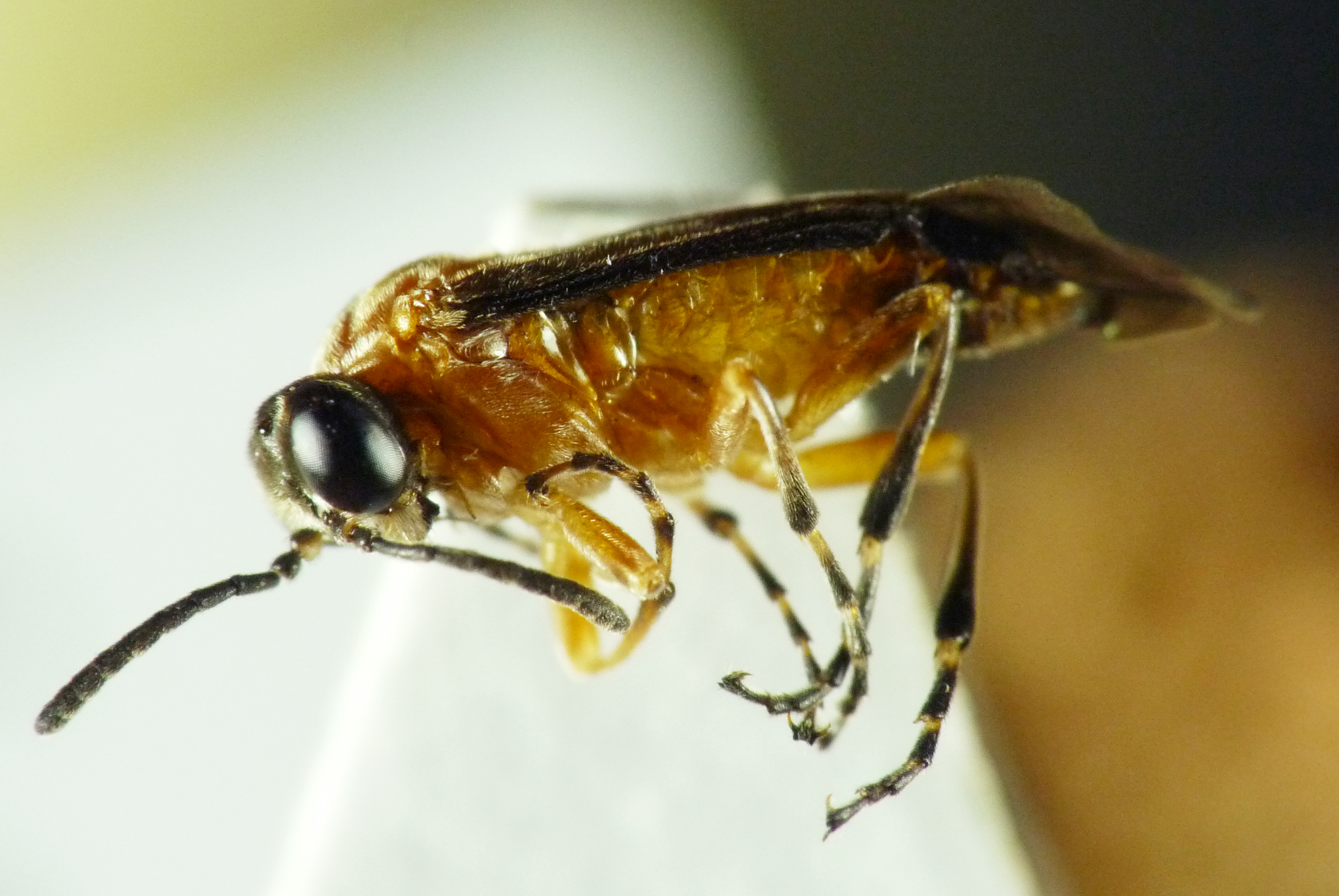 Athalia japonica